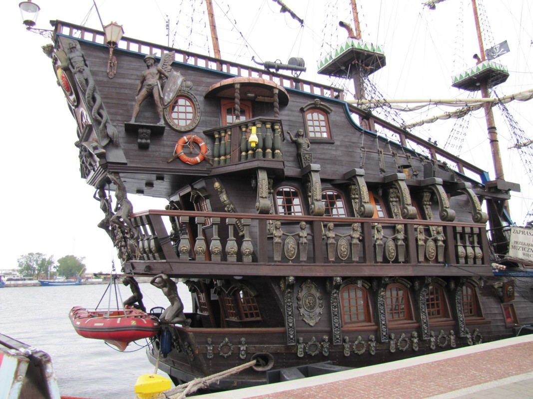 GALEON.